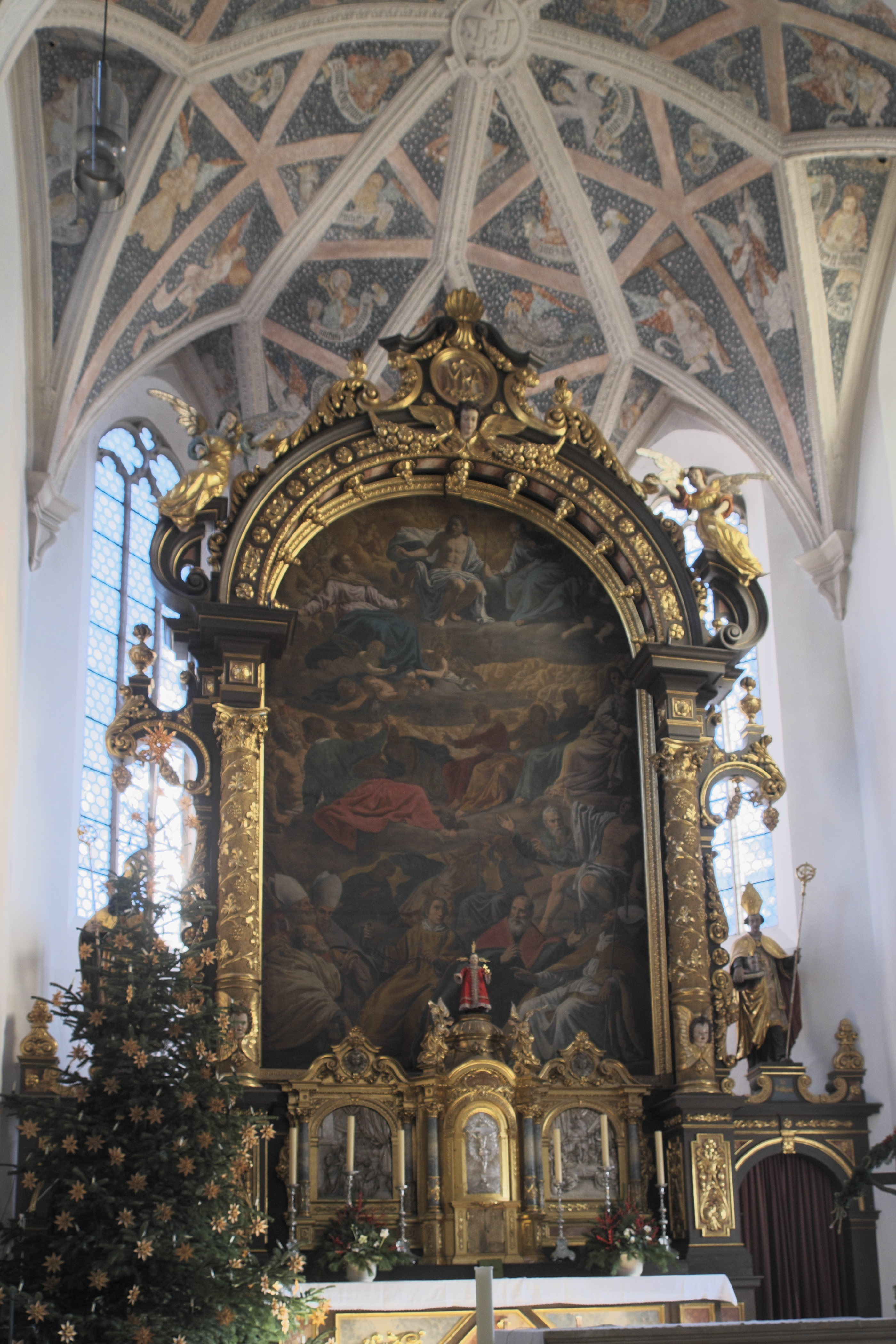 Katholische Pfarrkirche St. Emmeram, ehemalige Benediktinerinnen-Klosterkirche Mariä Himmelfahrt, in Geisenfeld im Landkreis Pfaffenhofen an der Ilm (Bayern/Deutschland), Hochaltar